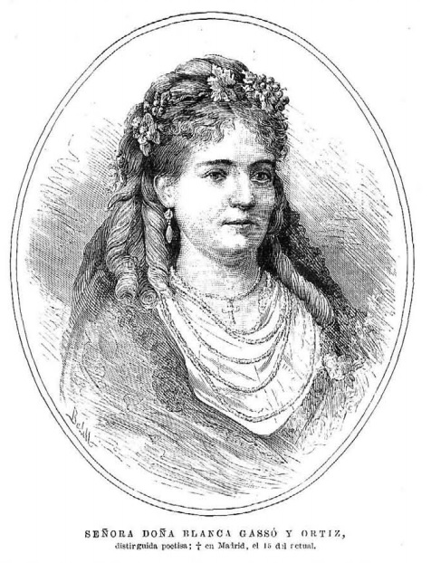 Blanca Gassó y Ortiz